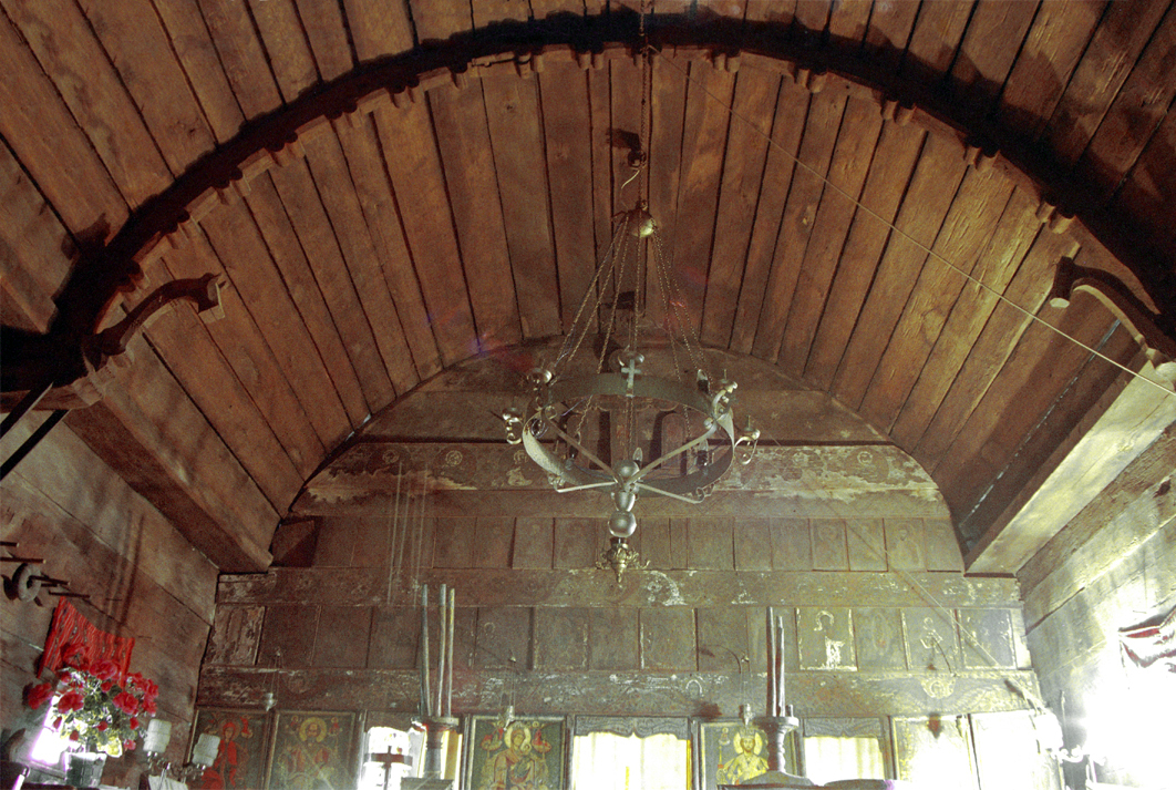 Comuna Leleasca, Olt, parohia Păroşi, biserica de lemn din fostul sat Ştefăneşti. Bolta peste biserica bărbaţilor. Arcul dublou descărcat pe console sculptate în formă de cal.